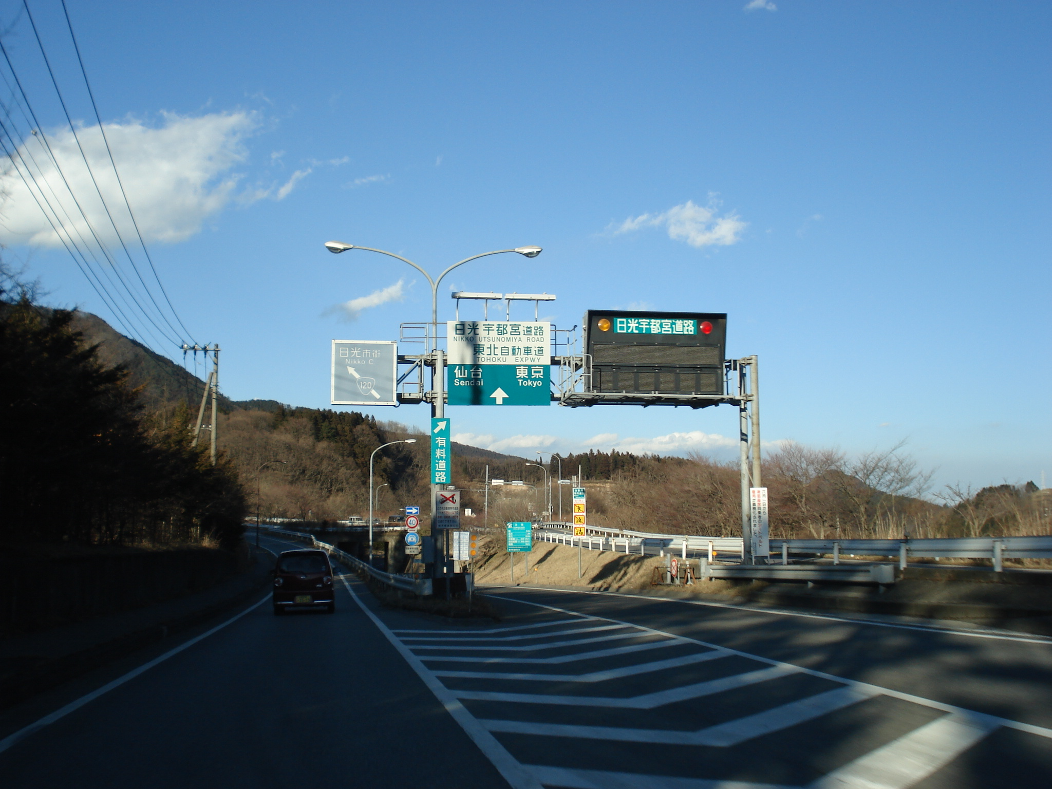 日光宇都宮道路 清滝インターチェンジ 流入路 栃木県日光市